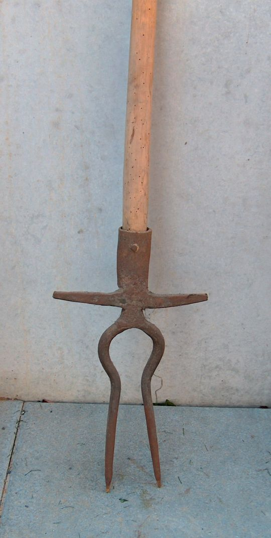 Ein Rübenheber zur Ernte von Zuckerrüben